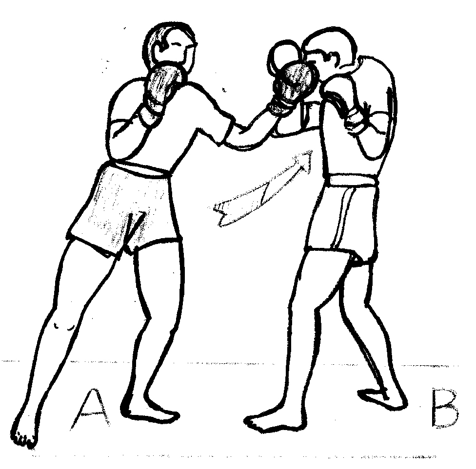 semi-crochet2.jpg